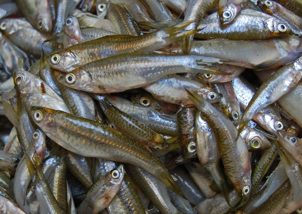 Rasbora argyrotaenia. From Rawagembol, Prembun, Tambak (7°38.3’S 109°23.9’E), Banyumas, Central Java, Indonesia